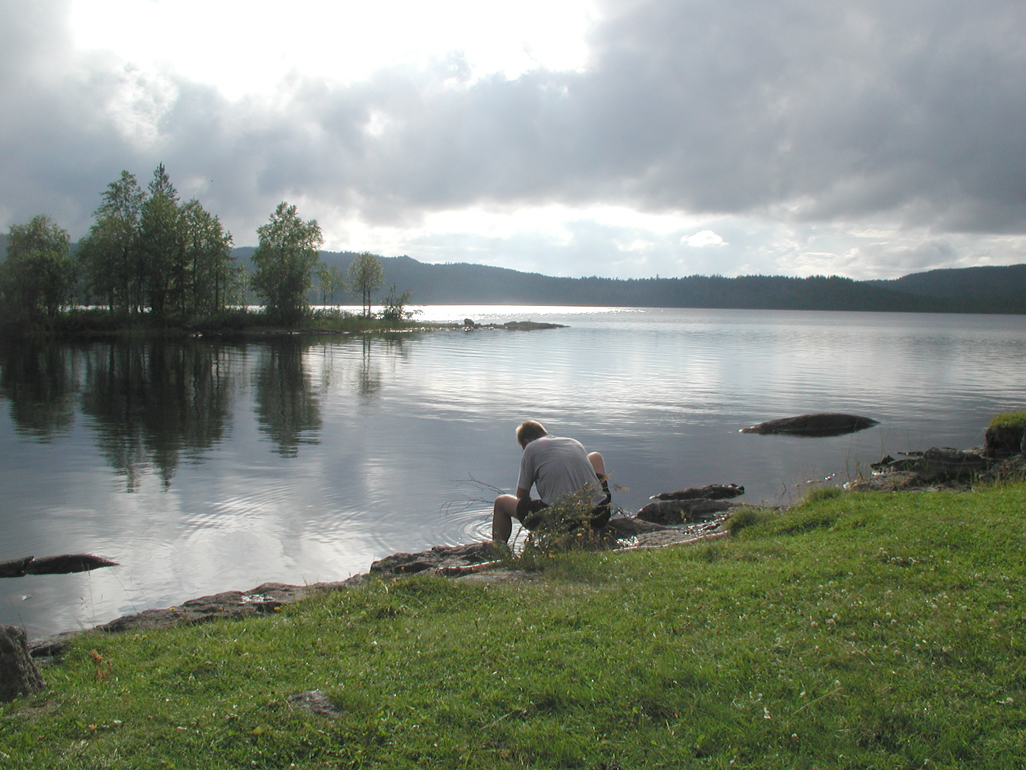 Storflåtan